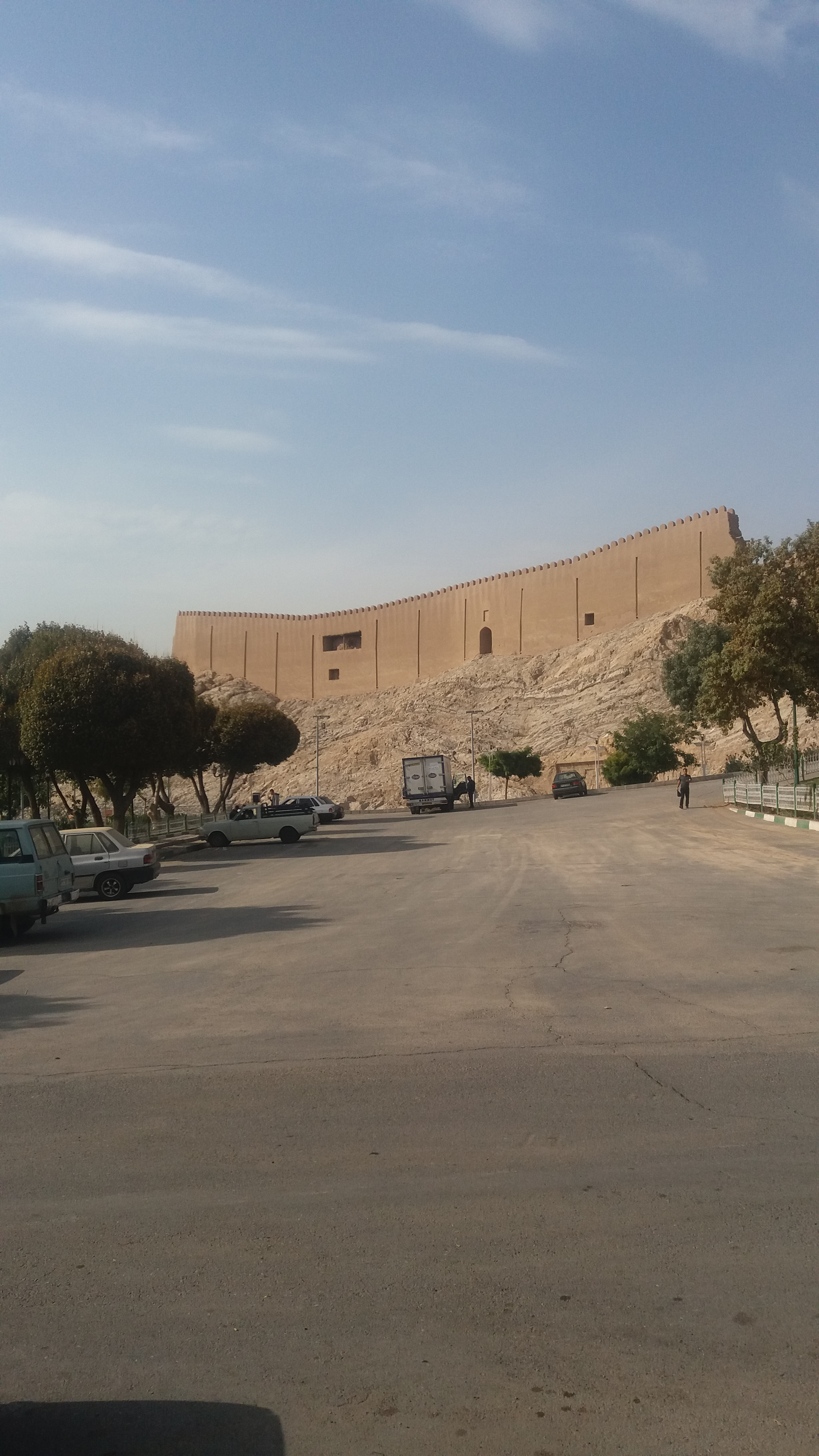 نمایی از دور از موقعیت باروی ری - آبان ۱۳۹۴